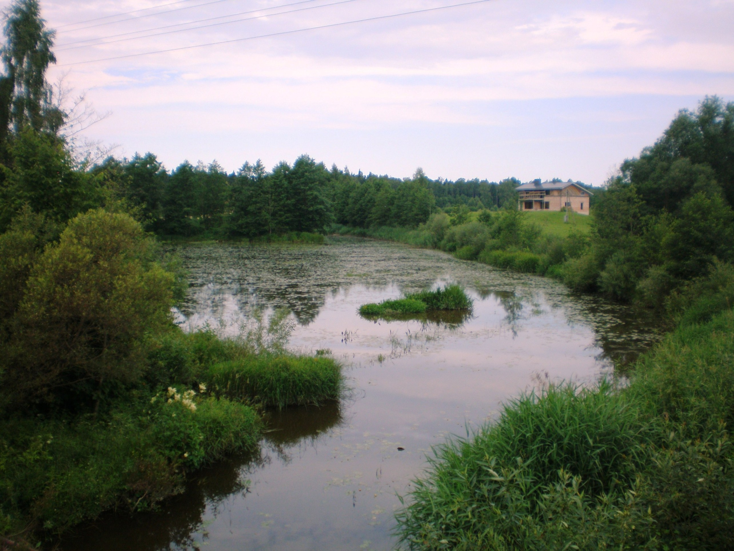 Vabalkšnė Ąžuolų Būdoje, Kazlų Rūdos sav.